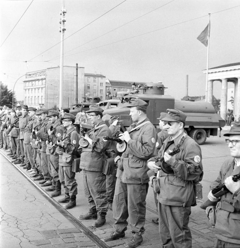 Title: Berlin, Mauerbau, Kampfgruppen am Brandenburger Tor Additional information